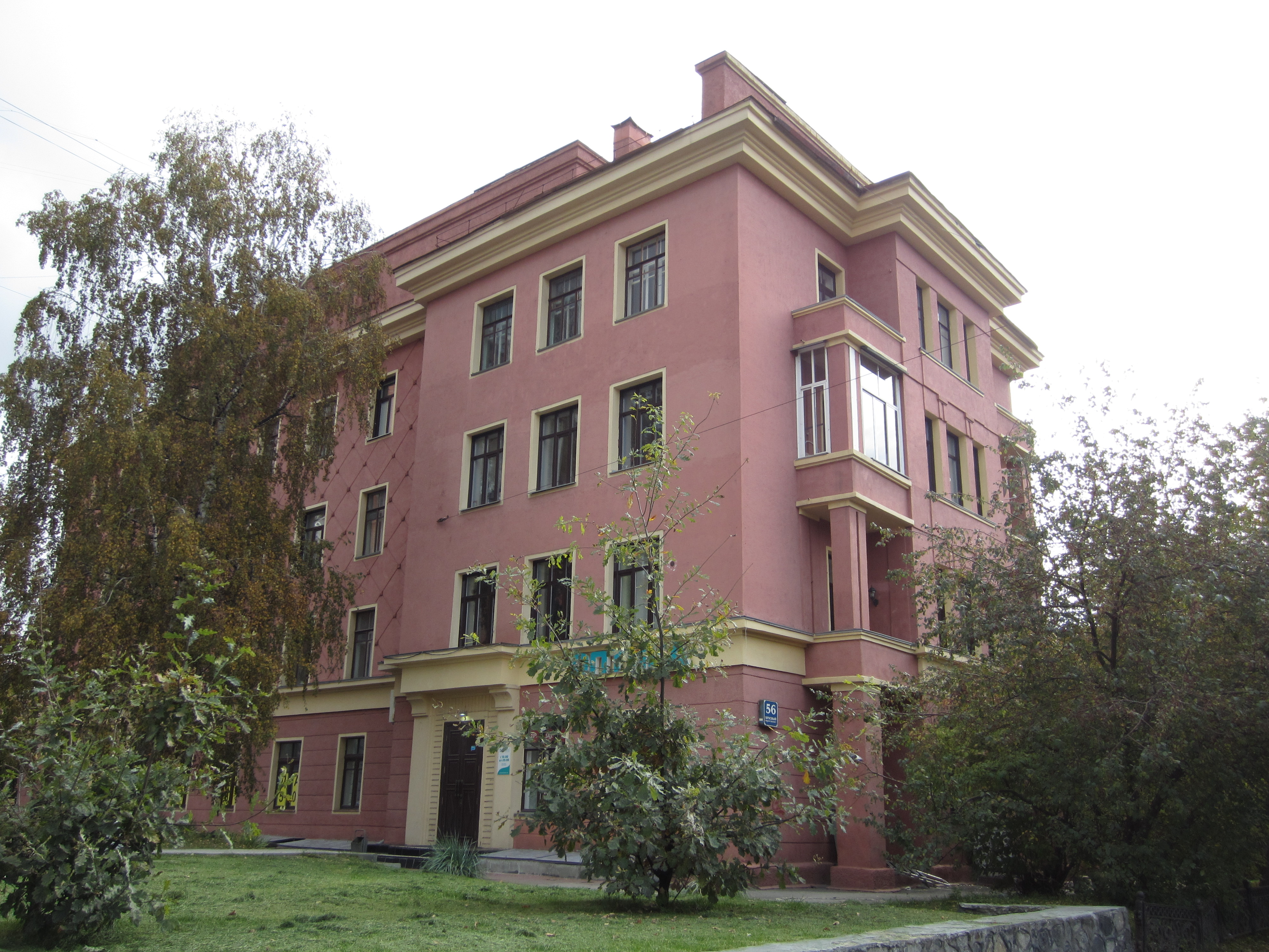 Дом жилой «Облплана», Красный проспект, 56, Центральный район, Новосибирск, Новосибирская область